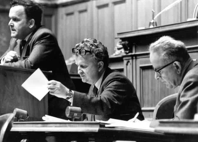 Otto Stich, Schweizer Nationalrat (vor der Wahl in den Bundesrat) links am Rednerpult im Nationalratssaal